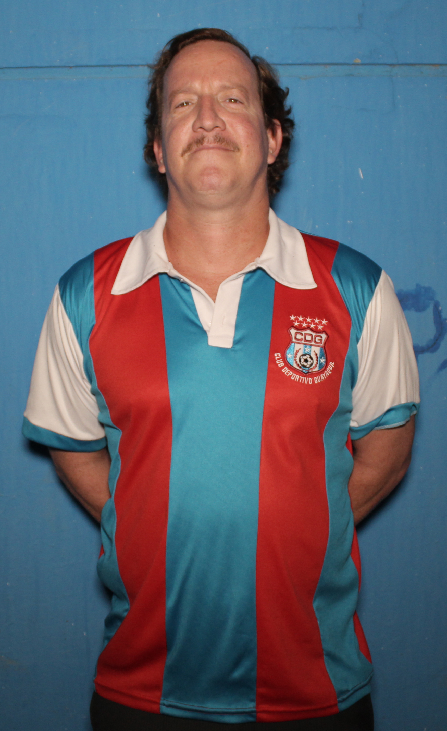 Andrés Crespo interpretando a Terán con la camiseta del equipo de fútbol ficticio Club Deportivo Guayaquil durante el rodaje de la película Sin Muertos No Hay Carnaval de Sebastián Cordero en mayo de 2015.